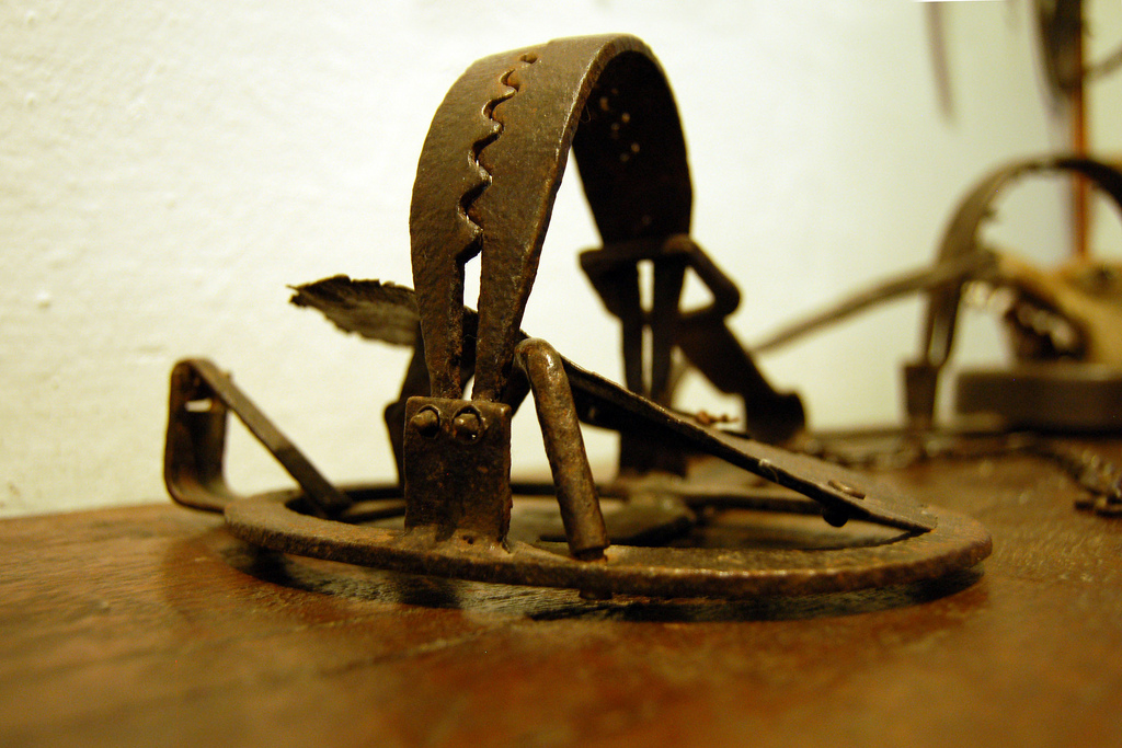 Museo Etnográfico de Cantabria